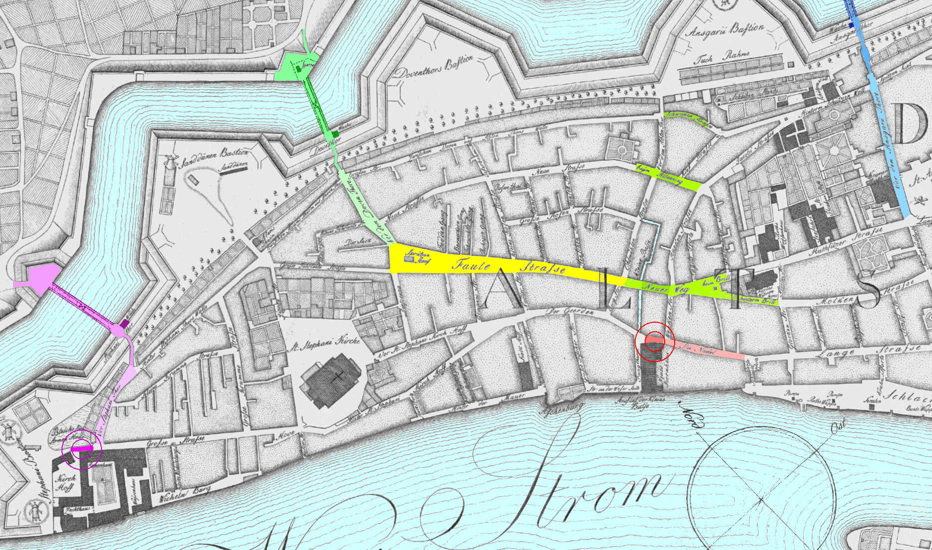 Das Stephaniviertel als Ausschnitt aus dem Stadtplan von Bremen aus dem Jahr 1796 von Carl Ludwig Murtfeldt, Originaltitel: Grundriſs der Kayserl. Freien Reichs und Handels Stadt Bremen; Bearbeitung: farbliche Hervorhebung der Faulenstraße sowie der Torwege der mittelelterlichen Stadttore, die 1796 längst abgerissen waren, im Fall der Natel (rot) ersatzlos, bei den Toren an den Außengrenzen der Altstadt durch klassizistische Wachhäuser ersetzt. Die zu den Toren führenden Straßen mit entsprechenden Namen sind in blasser Version der Torwegfarben unterlegt.